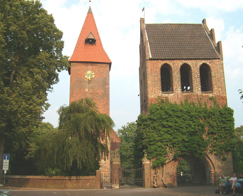 St. Ulrichs-Church in Rastede, Germany